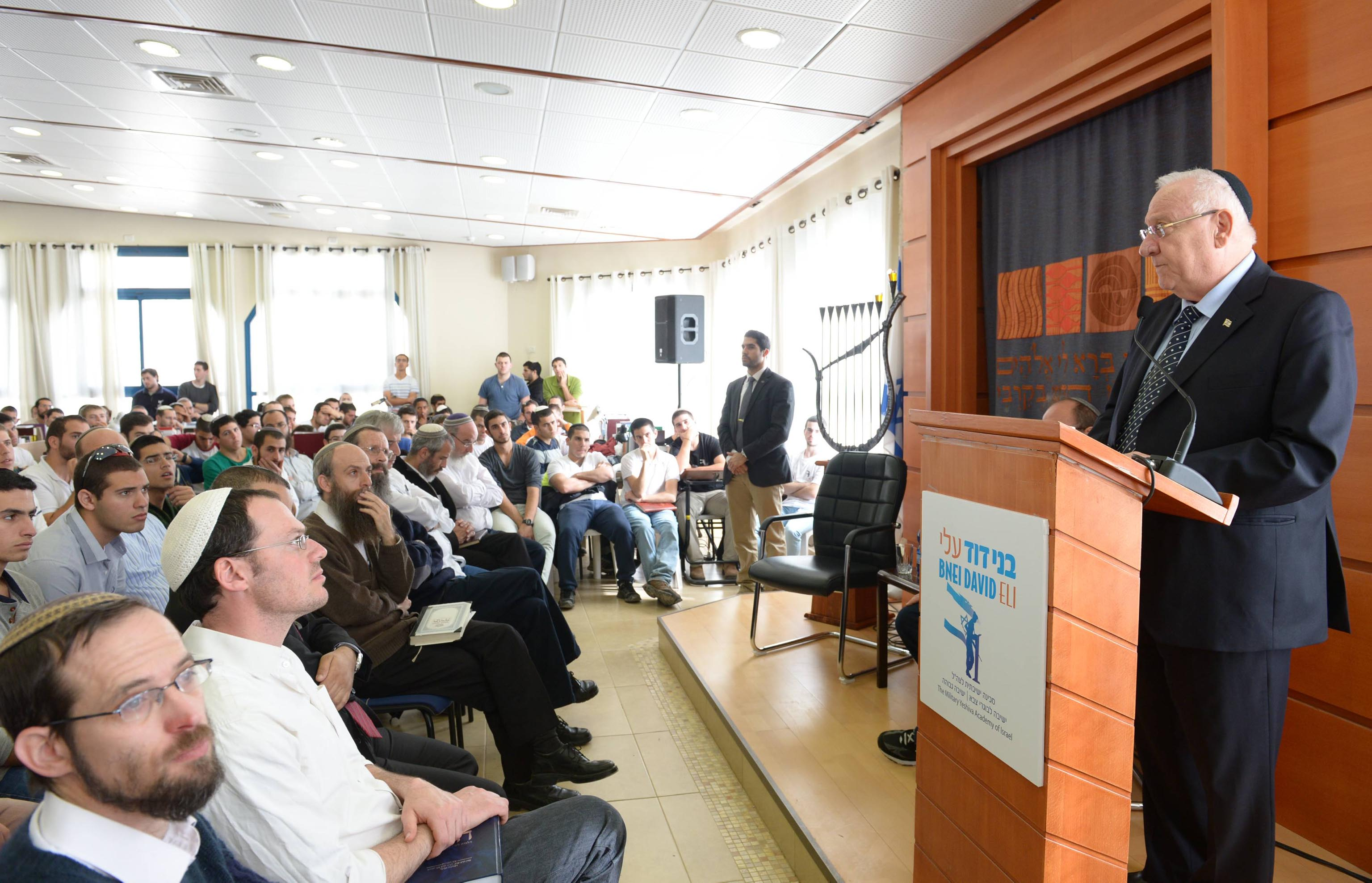 ראובן ריבלין נשיא מדינת ישראל בביקור במכינה הקדם צבאית בני דוד בעלי, בביקור נפגש עם ראשי המכינה ועם כ-400 תלמידי הישיבה לשיחה פתוחה